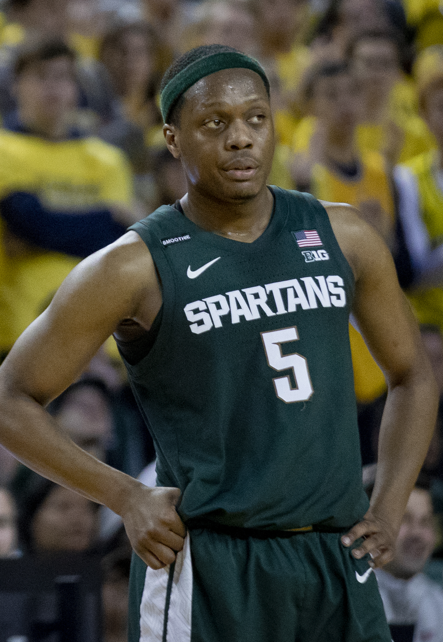 _O6A6786